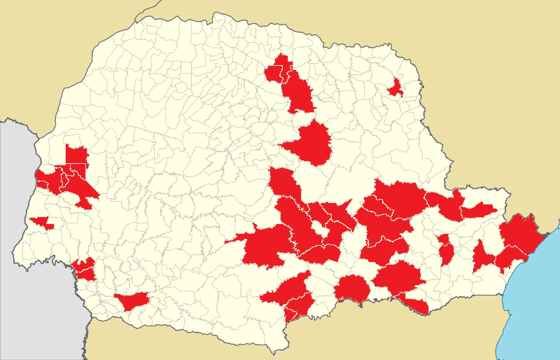 Municípios com colonização alemã no Paraná. O estado do Paraná pode ser dividido basicamente em quatro regiões de colonização alemã: Curitiba e Campos Gerais; Centro-Sul; Norte; Oeste. Os 30 municípios (na cor vermelha) com colônias alemãs representados no Paraná: Curitiba, Rio Negro, Lapa, Palmeira, Ponta Grossa, Ipiranga, Ivaí, Carambeí, Castro, Cerro Azul, União da Vitória, Cruz Machado, Irati, Imbituva, Prudentópolis, Guarapuava, Cambé, Rolândia, Joaquim Távora, Marechal Cândido Rondon, Toledo, Maripá, Nova Santa Rosa, Quatro Pontes, Palotina, Pato Bragado, Missal, Capanema, Planalto e Francisco Beltrão. Levantamento feito em 2020. Fontes: Prefeituras Municipais; Governo do Paraná; UFPR; UEPG; Unicentro; Unioeste; Unespar; UEL.